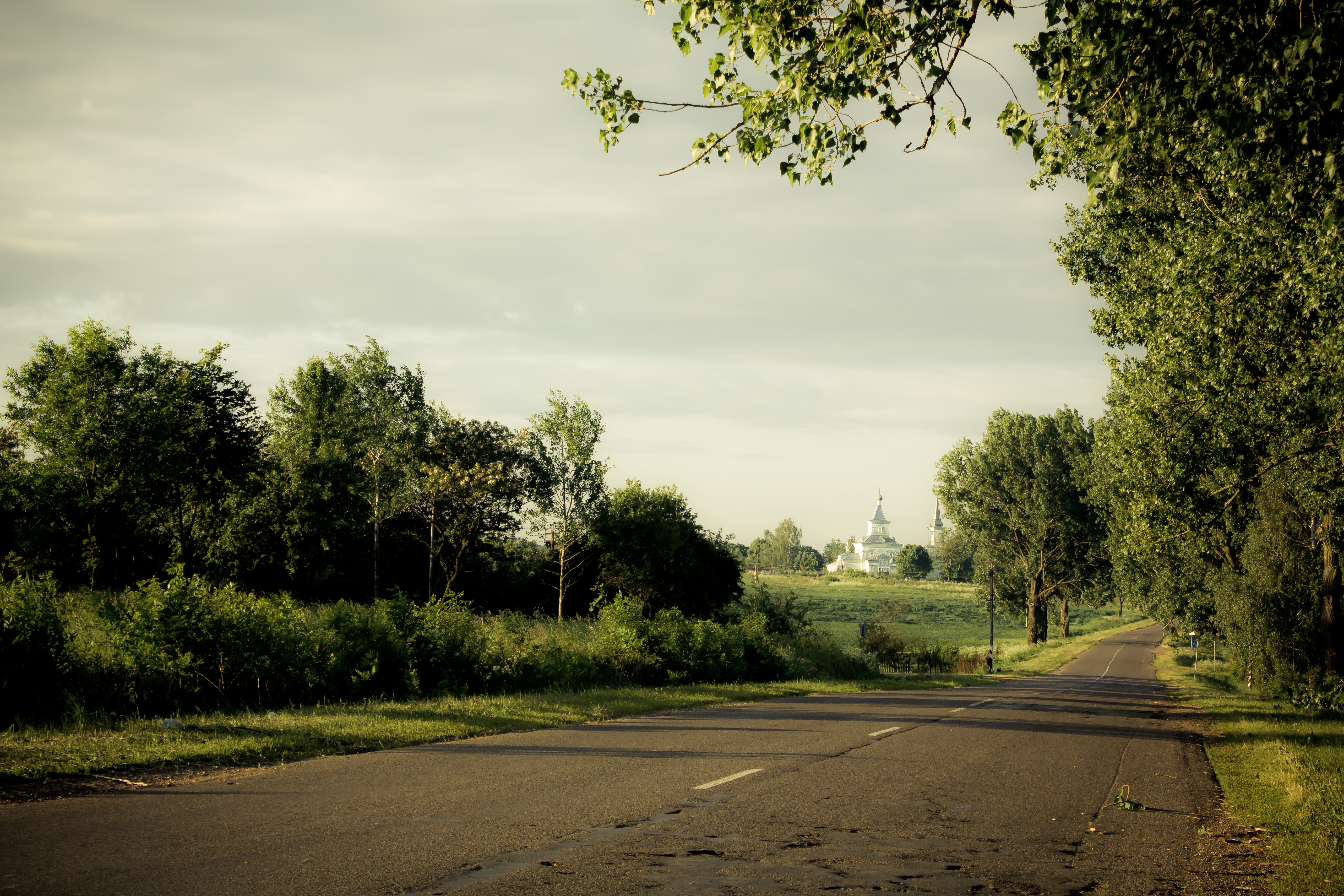 Беларуская (тарашкевіца): Сьвята-Георгіеўская царква. в. Лешня